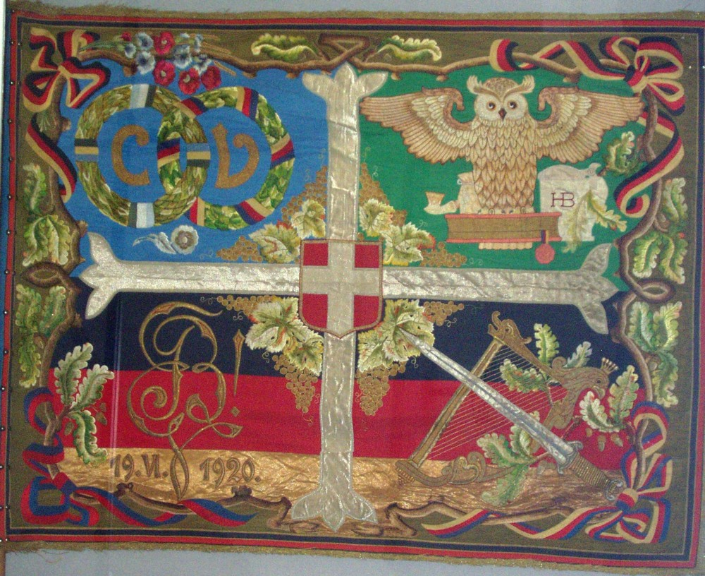 Prunkfahne der K.A.V. Bajuvaria aus der Grünungszeit